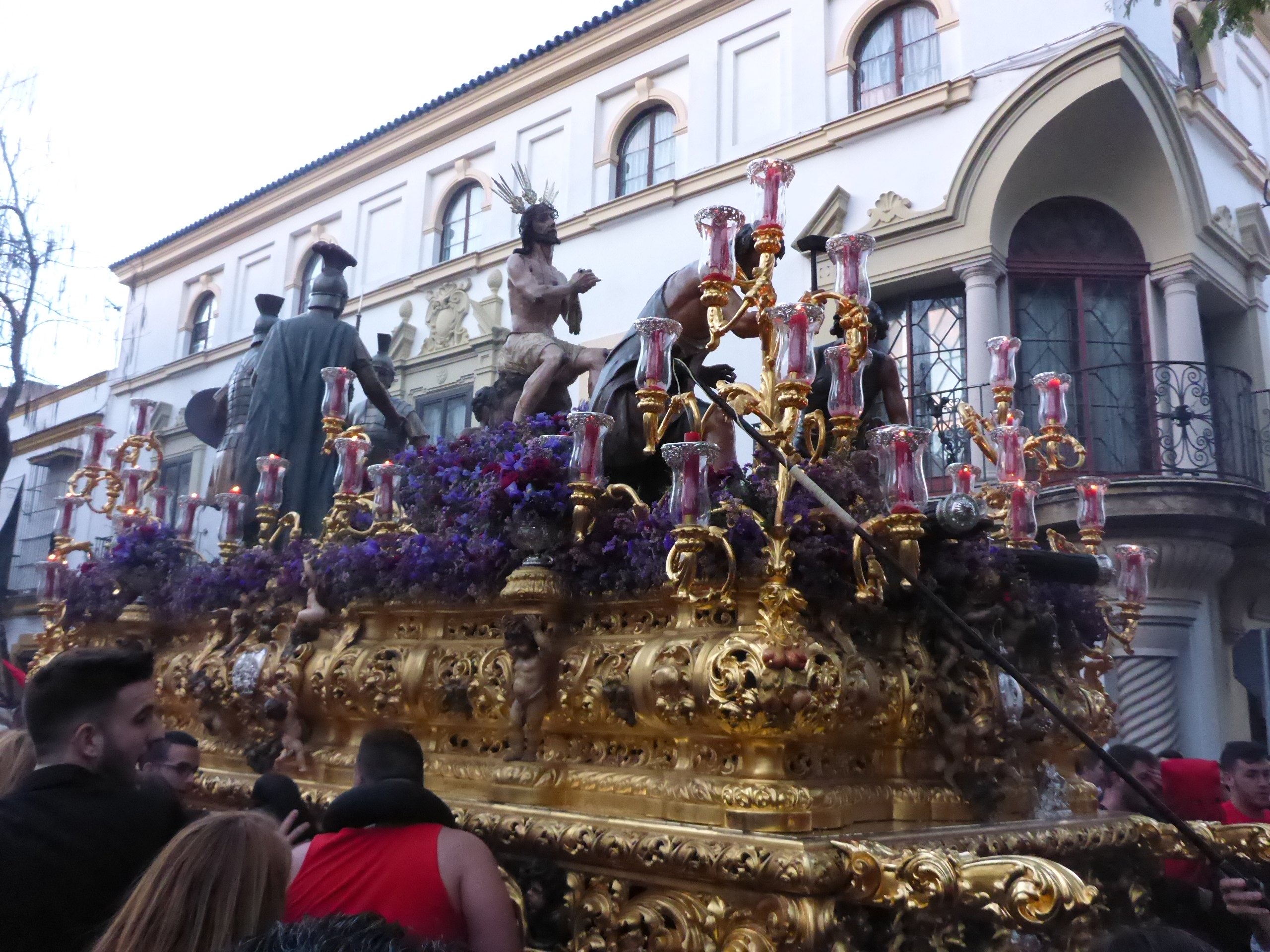 Hermandad de los Judíos de San Mateo (Jerez de la Frontera, España) This is a photography of a Folklore festival in Spain (Wikidata id Q6124533).